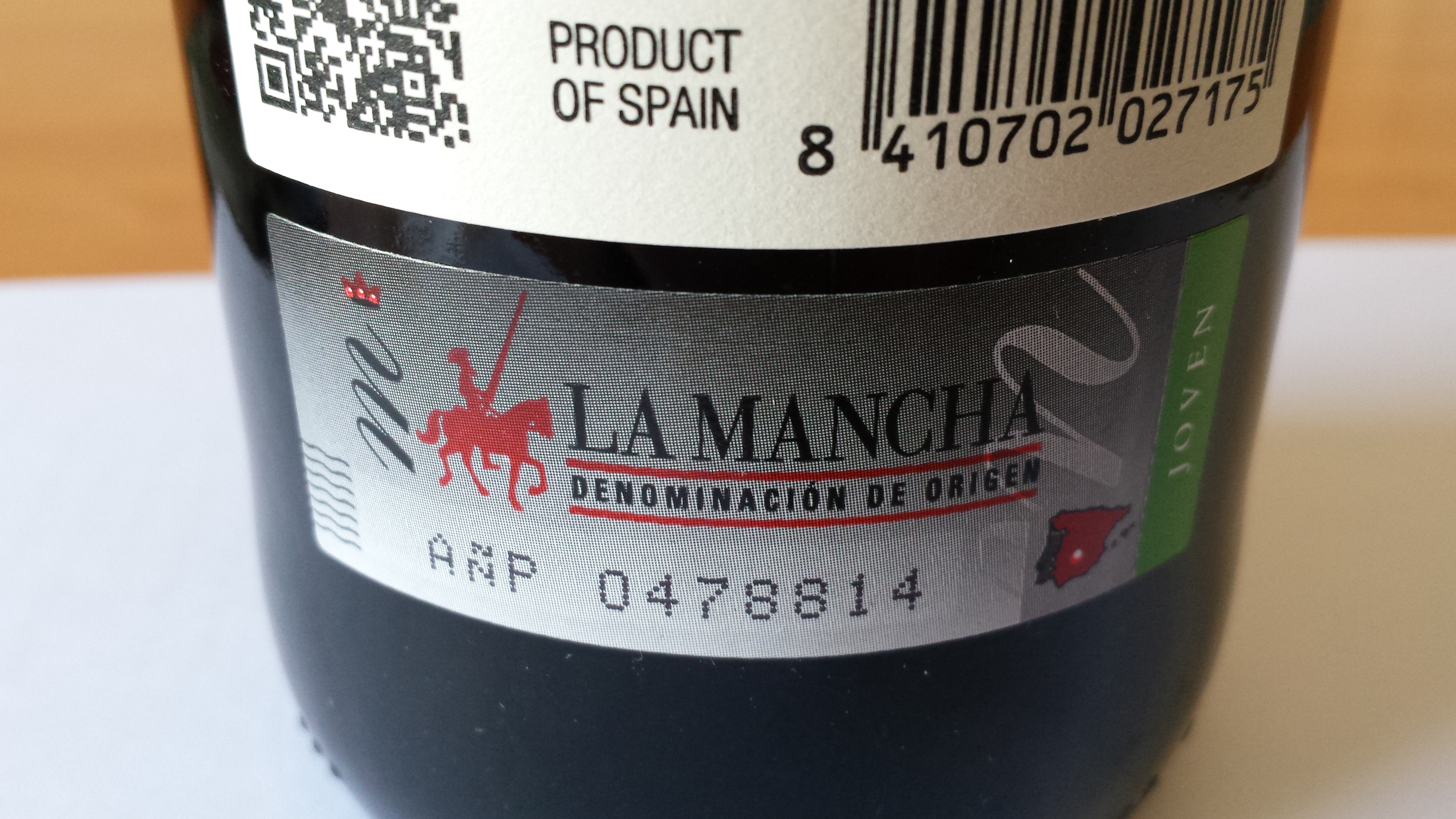 Etiqueta de la DO La Mancha, España